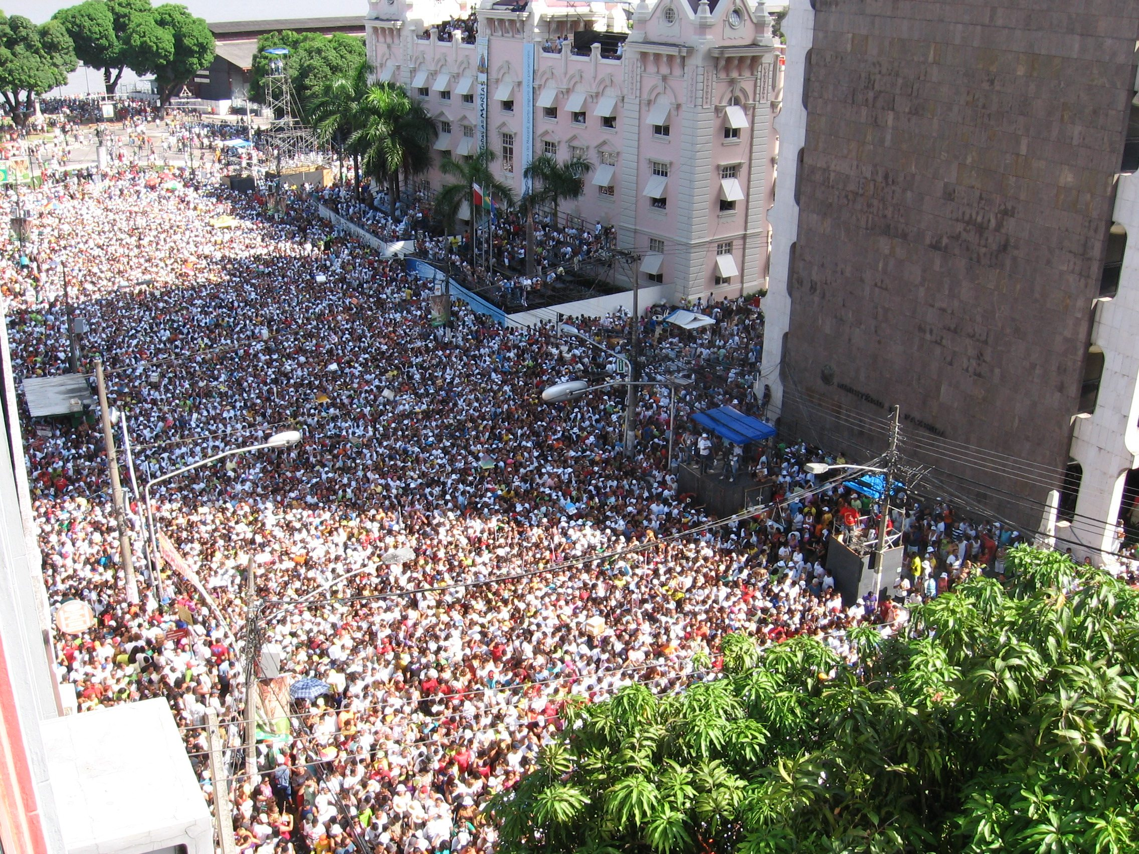 E a multidão foi atrás